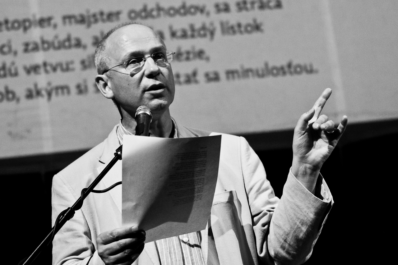 Měsíc autorského čtení 2014